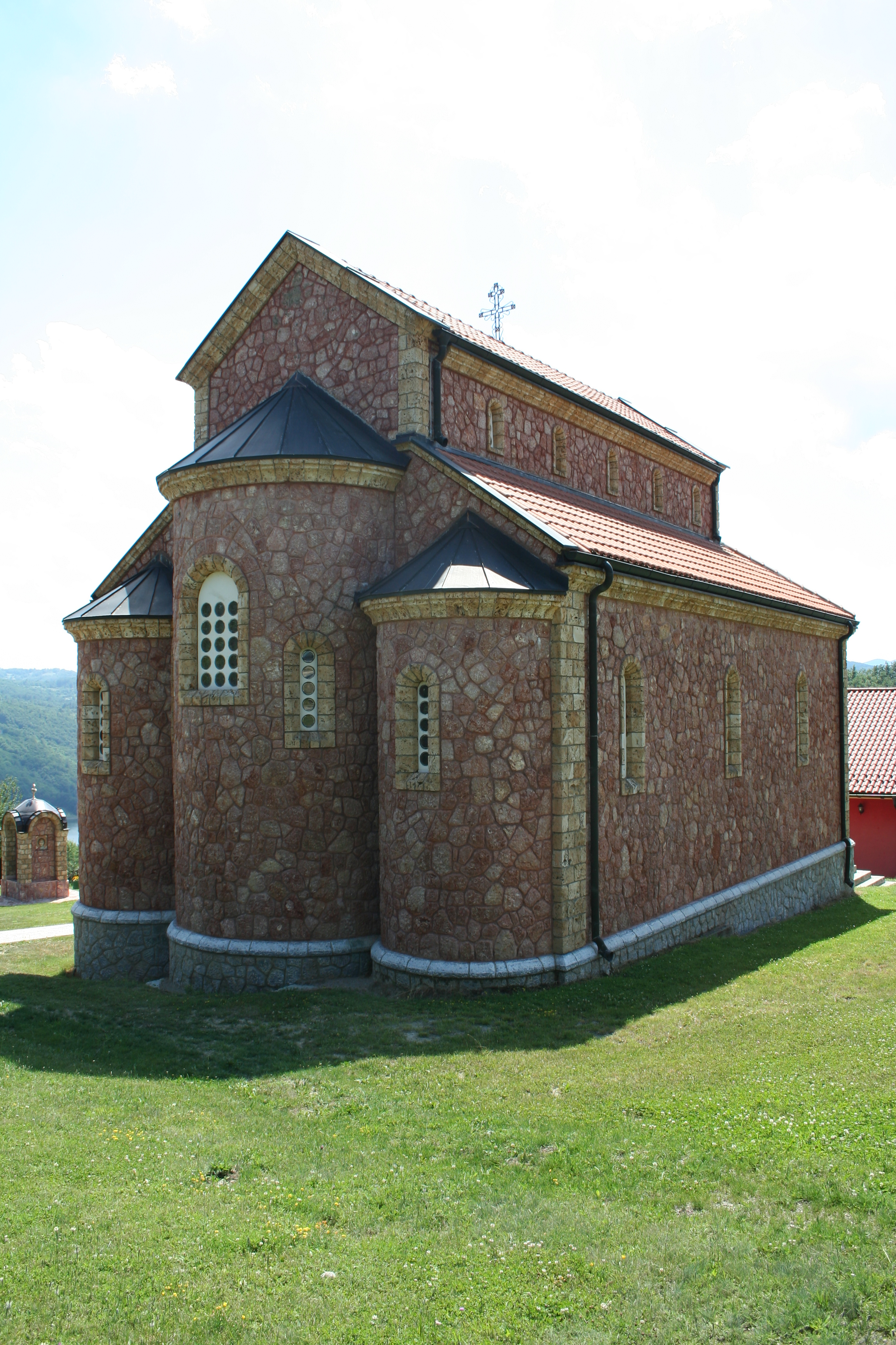 Manastir Rujan